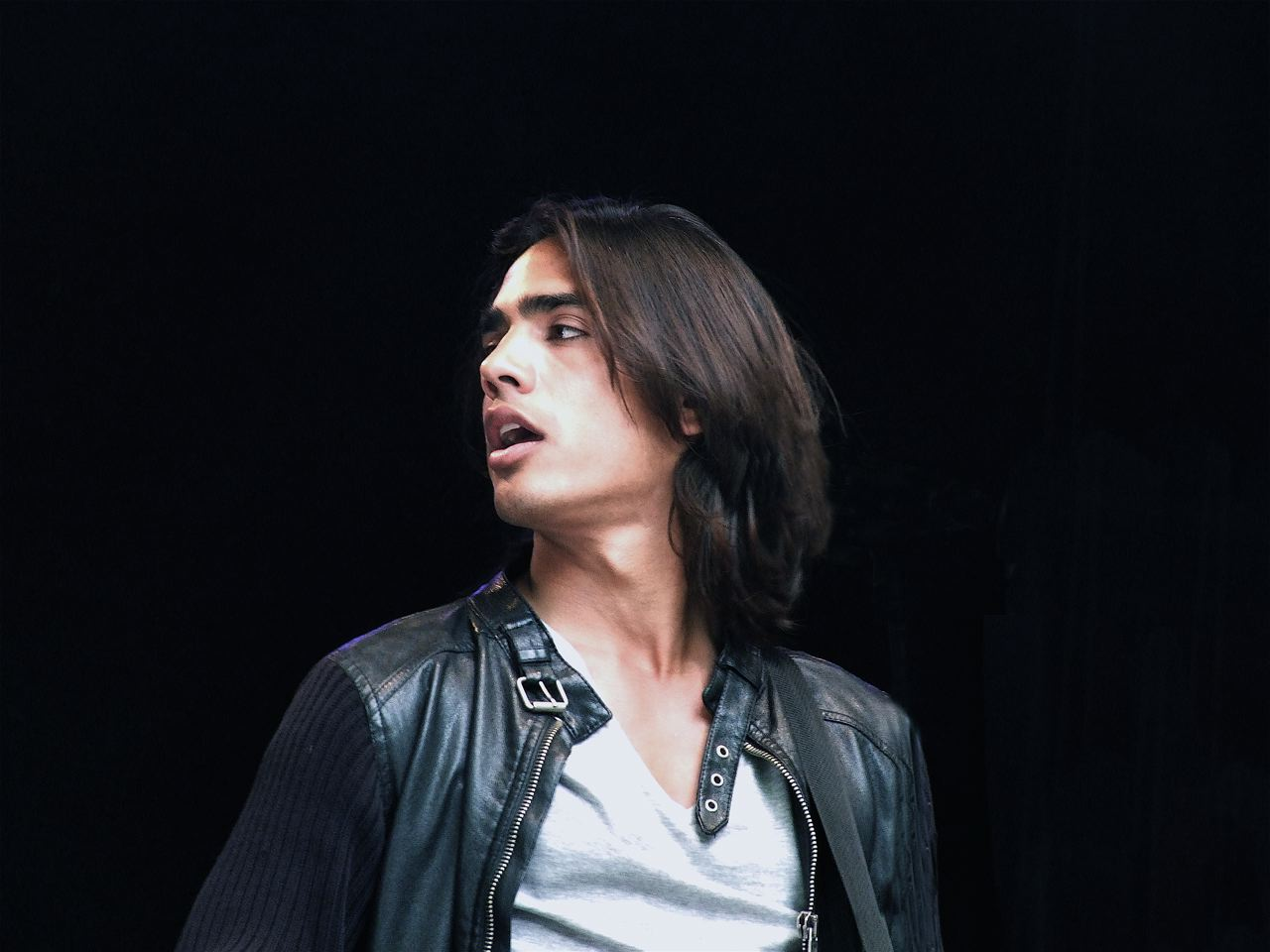 een bandlid van Valerius